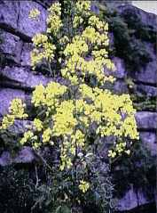 Sicilian botanical endemisms Brassica drepanensis